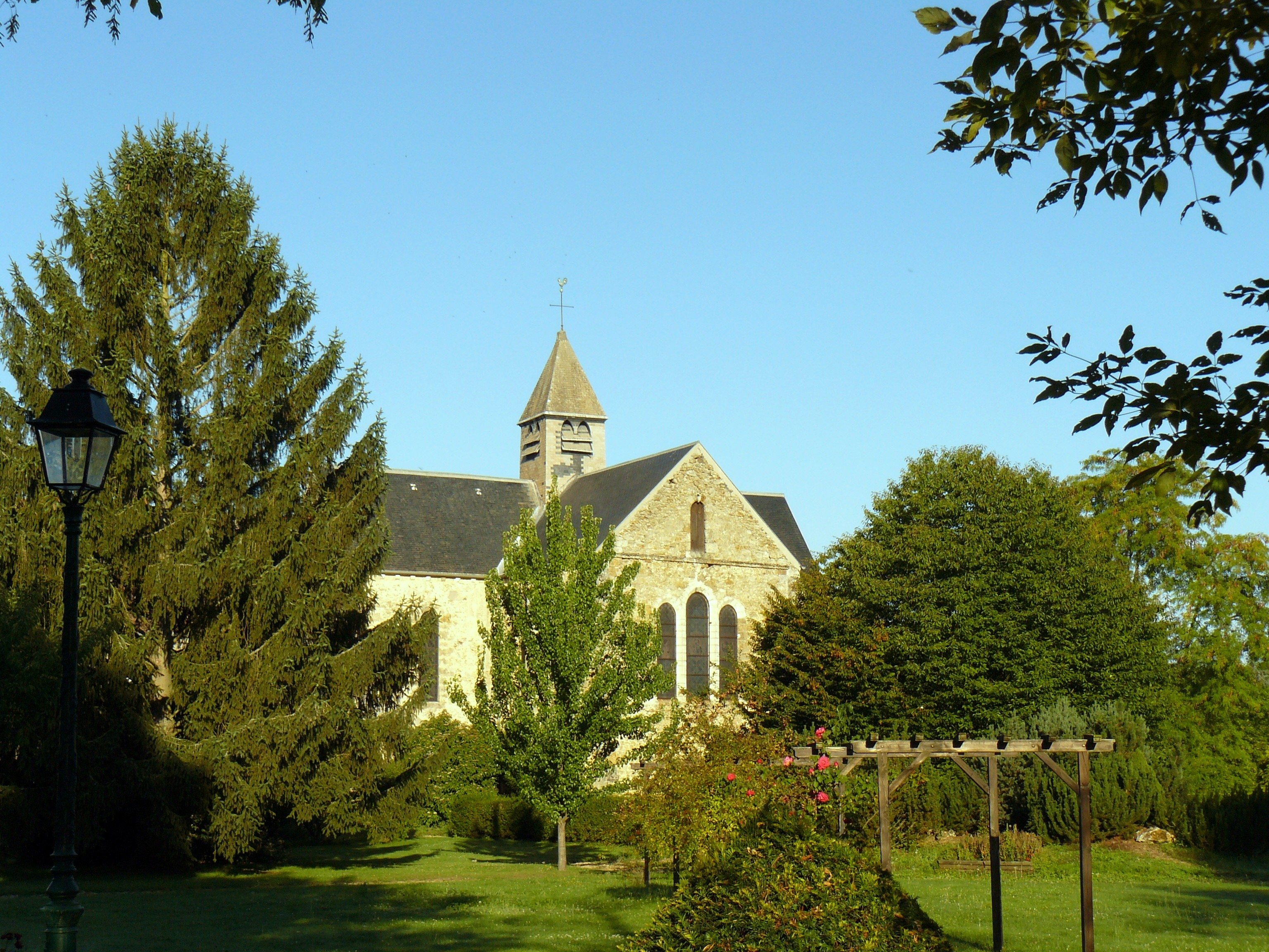 Abbaye Notre-Dame de la Roche à Lévis-Saint-Nom (Yvelines, France), aujourd'hui centre éducatif et de formation professionnelle